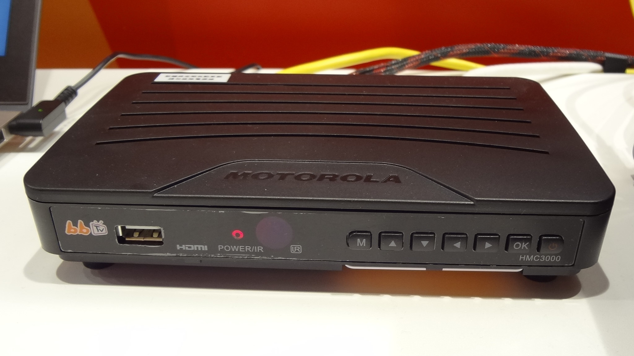 2013年資訊月，中嘉網路展示的bbTV機上盒Motorola HMC3000。